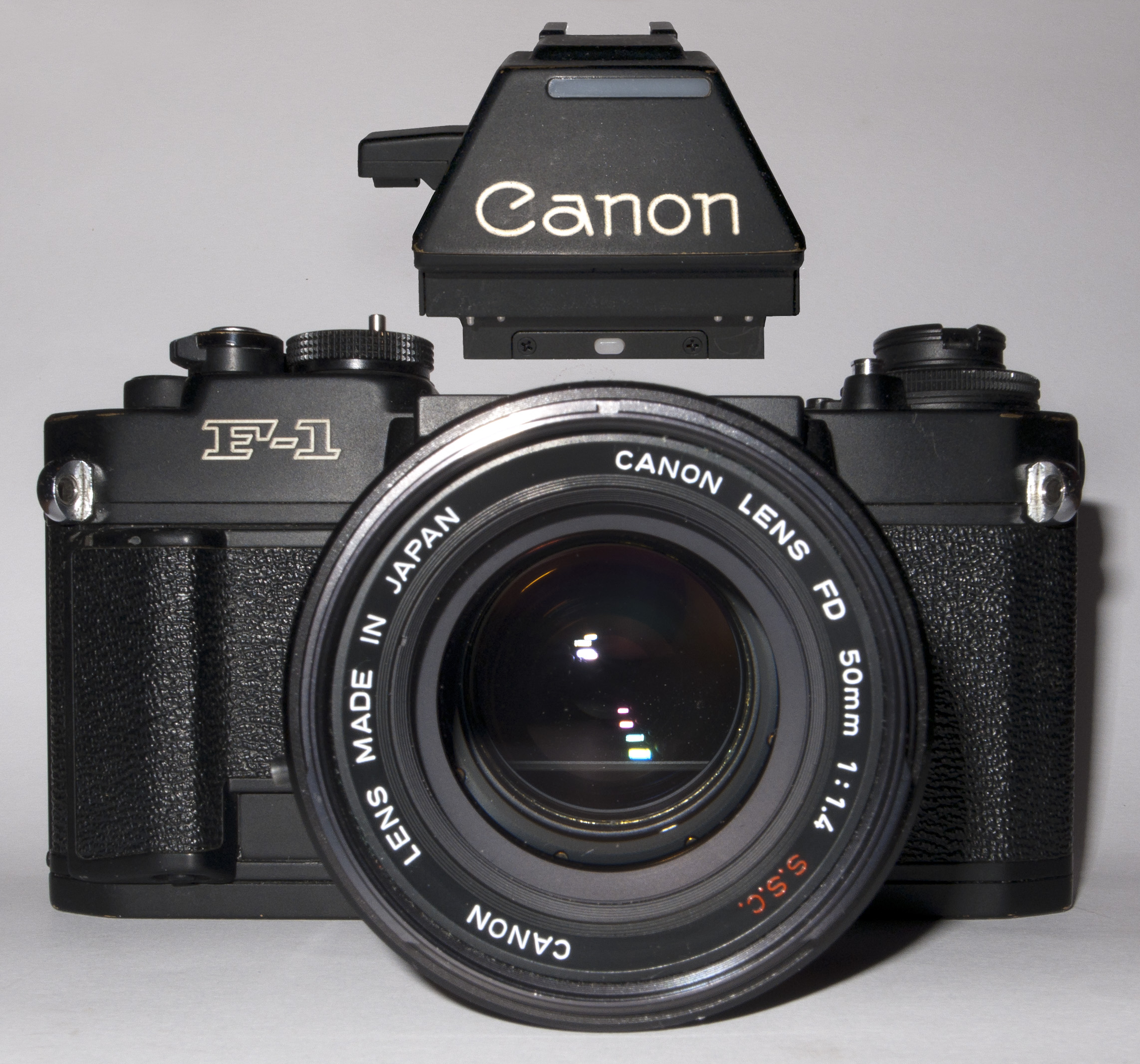 Canon F-1New mit AE-Sucher und FD 1.4/50mm Objektiv